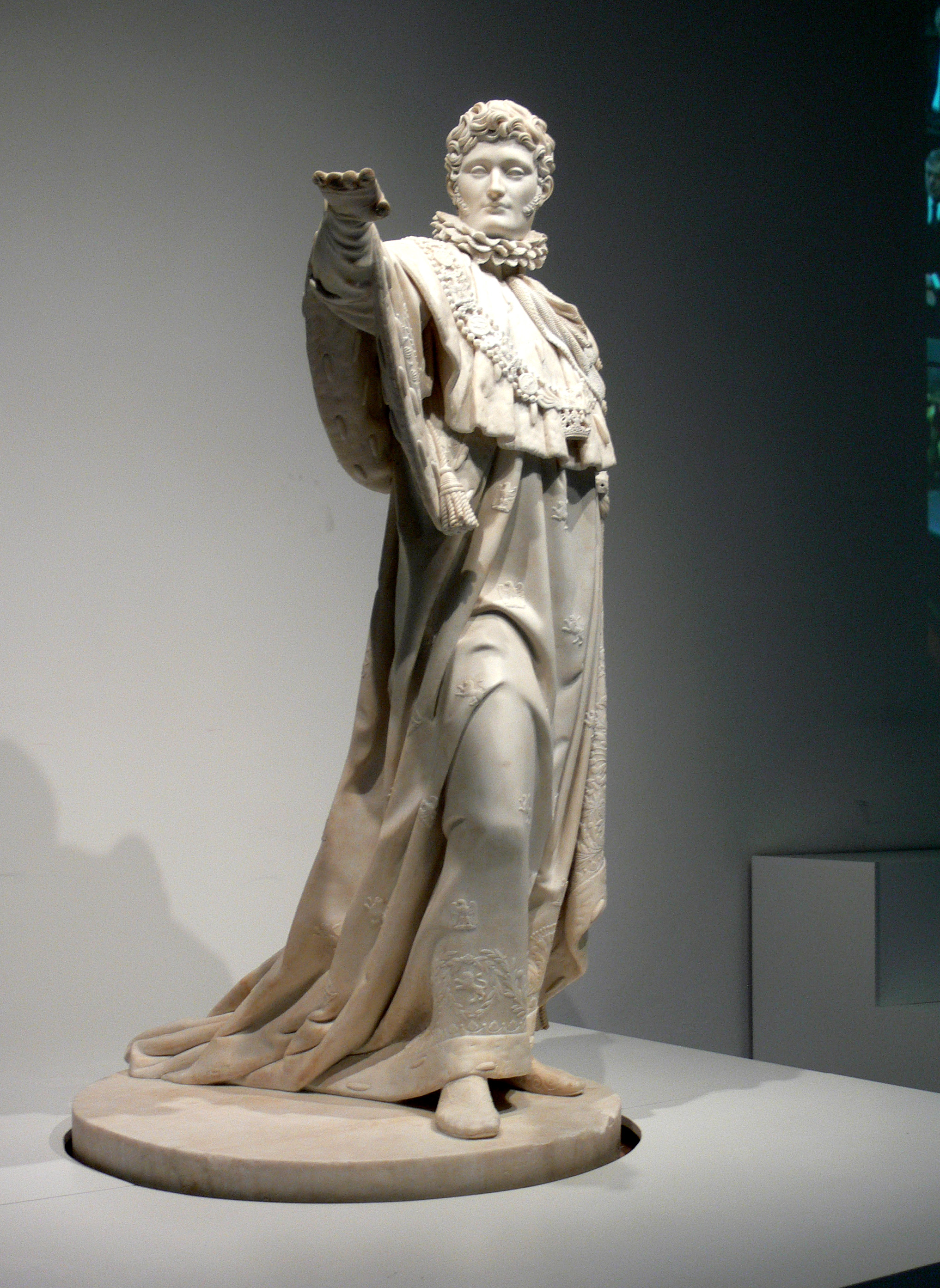 Marmorstatue von François-Joseph Bosio.Unter dem Arm stand vorher ein Sockel mit den Insignien und dem Code Napoleon. Die erste Marmorstatue eines Königs bei der Ablegung des Herrschereides. Sie sollte in Kassel aufgestellt werden, wurde aber nicht rechtzeitig fertig und kam schließlich nach Ajaccio auf Korsika.